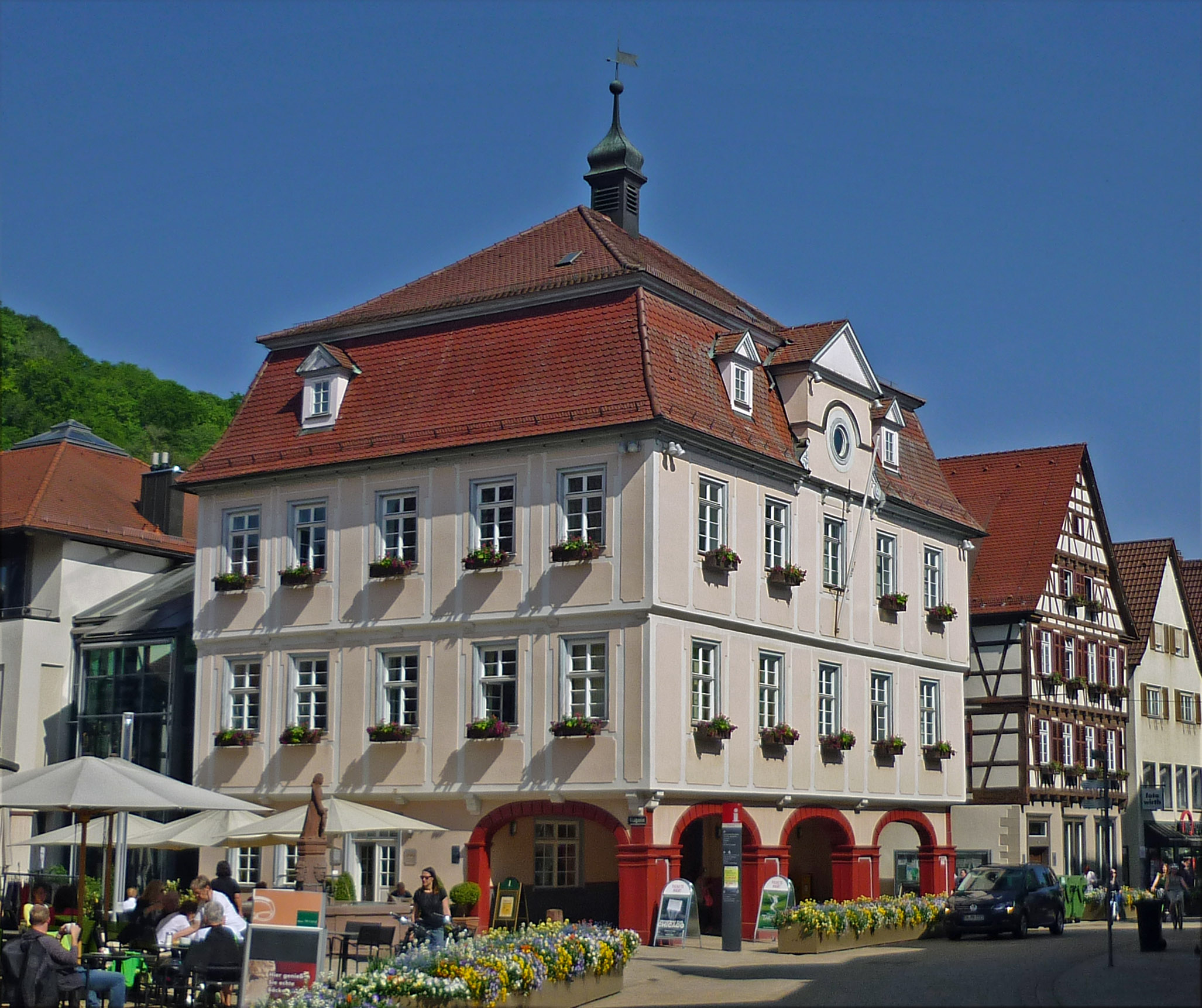 Rathaus in der Marktstraße in Nagold, Lkr. Calw (Württemberg)